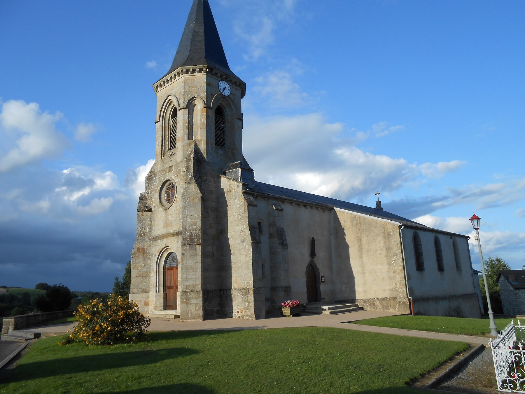 Glèisa Sant Peire de Goteiras